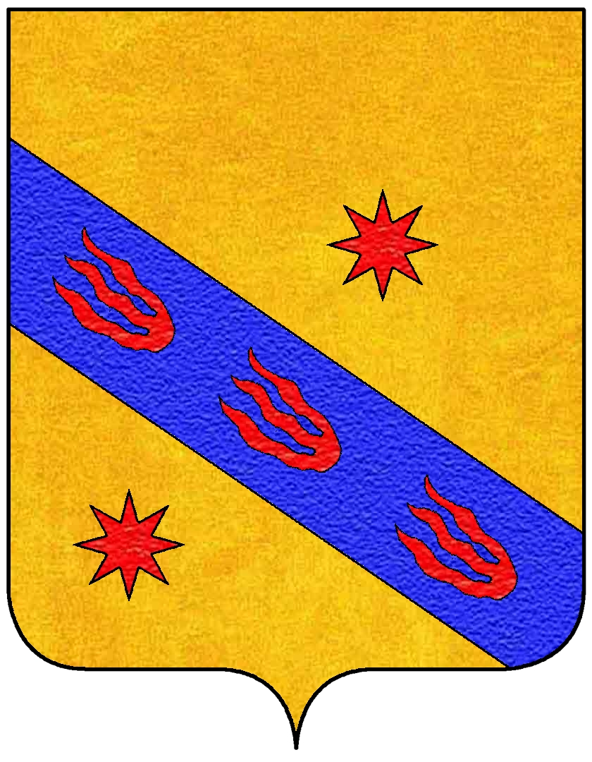 Stemma della famiglia Gabrielli